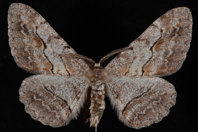 Stenoporpia pulmonaria